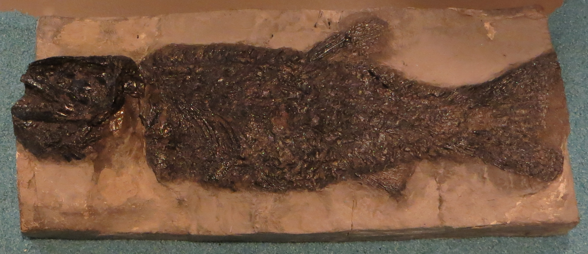 Fossil - Took The picture at Royal Belgian Institute of Natural Sciences, Brussels